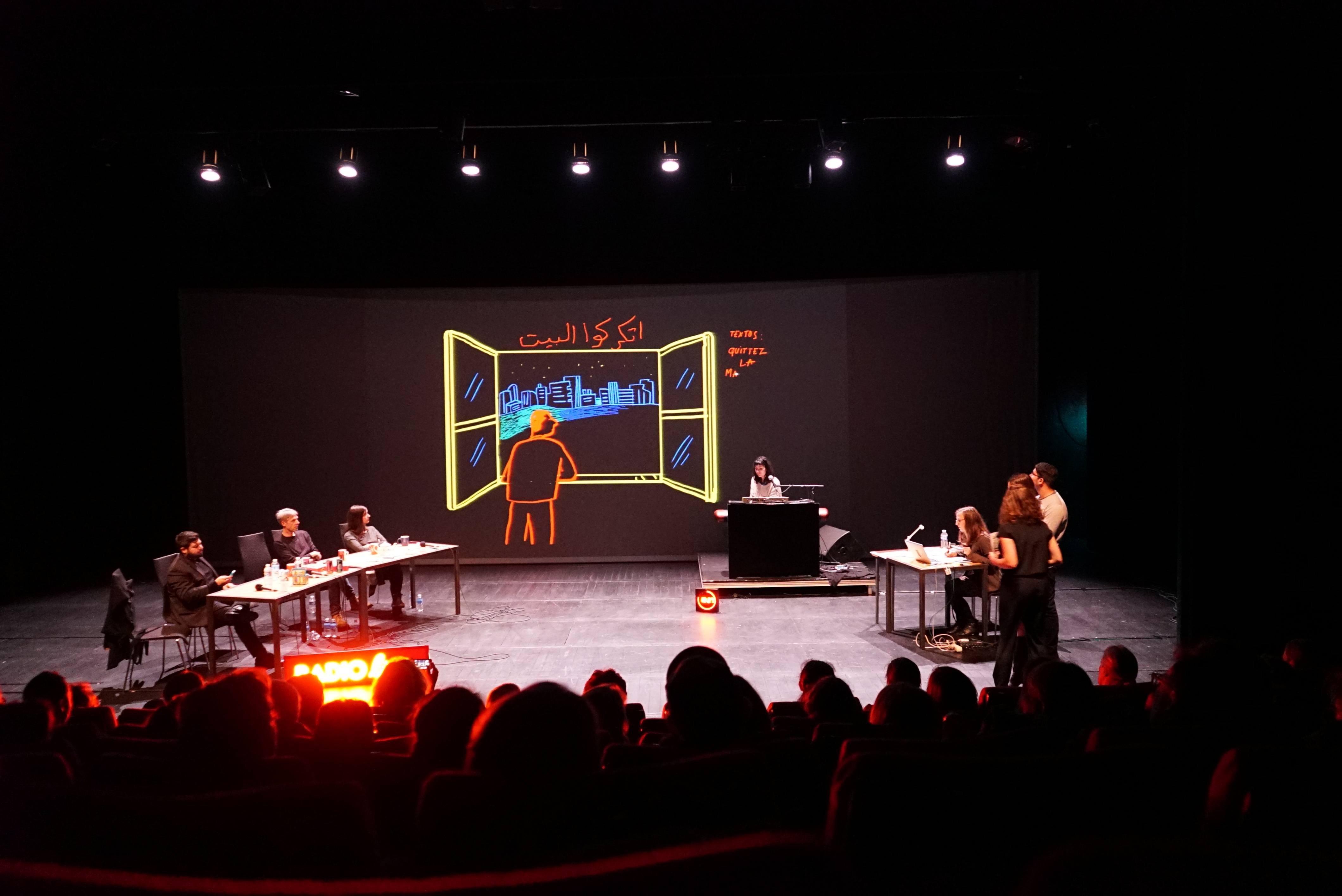 Radio live : Gaza, Beyrouth, Mostar